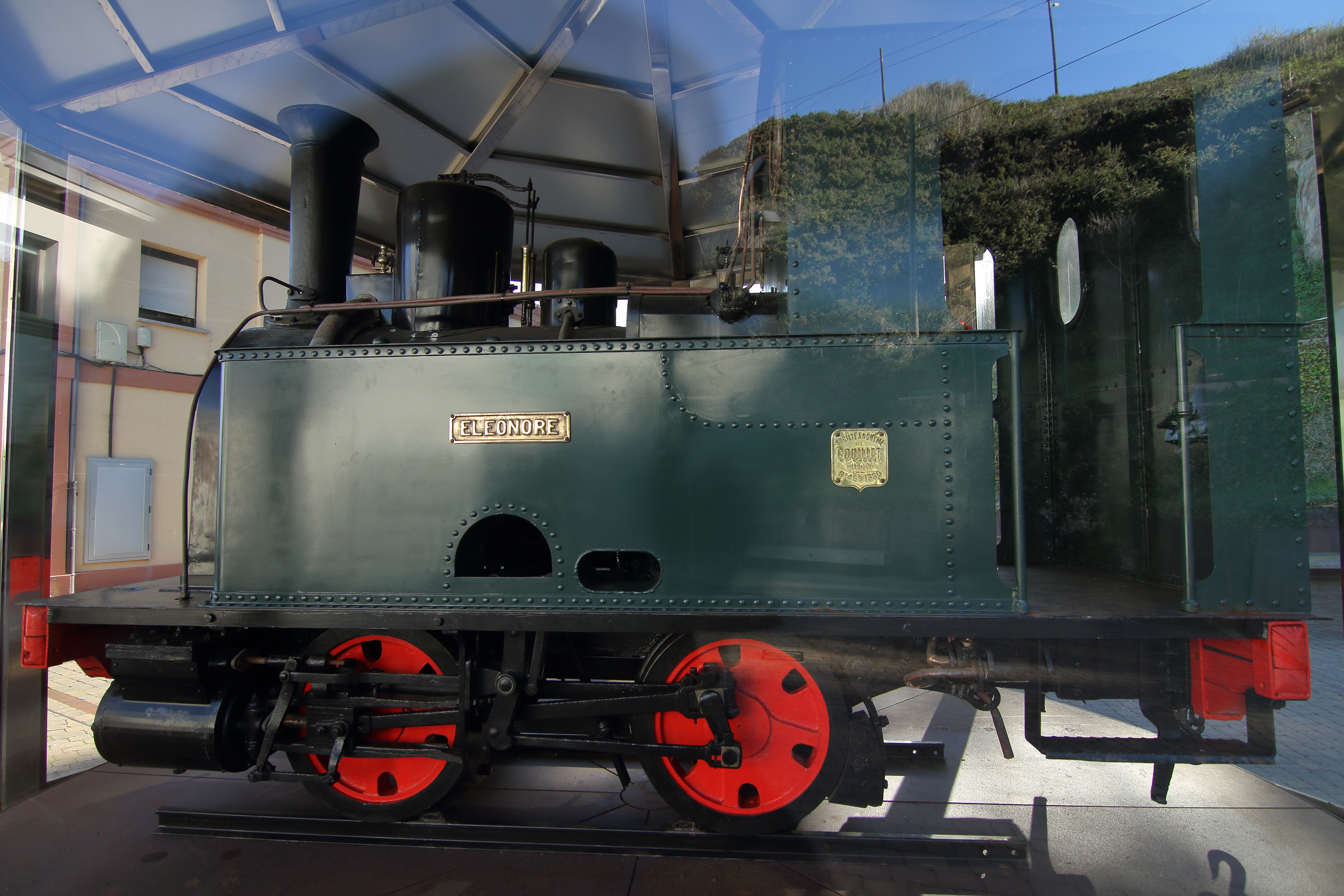 Locomotora Eleonore de 1880, mina de Arnao (Castrillón), una de la locomotoras de vía estrecha más antiguas de España